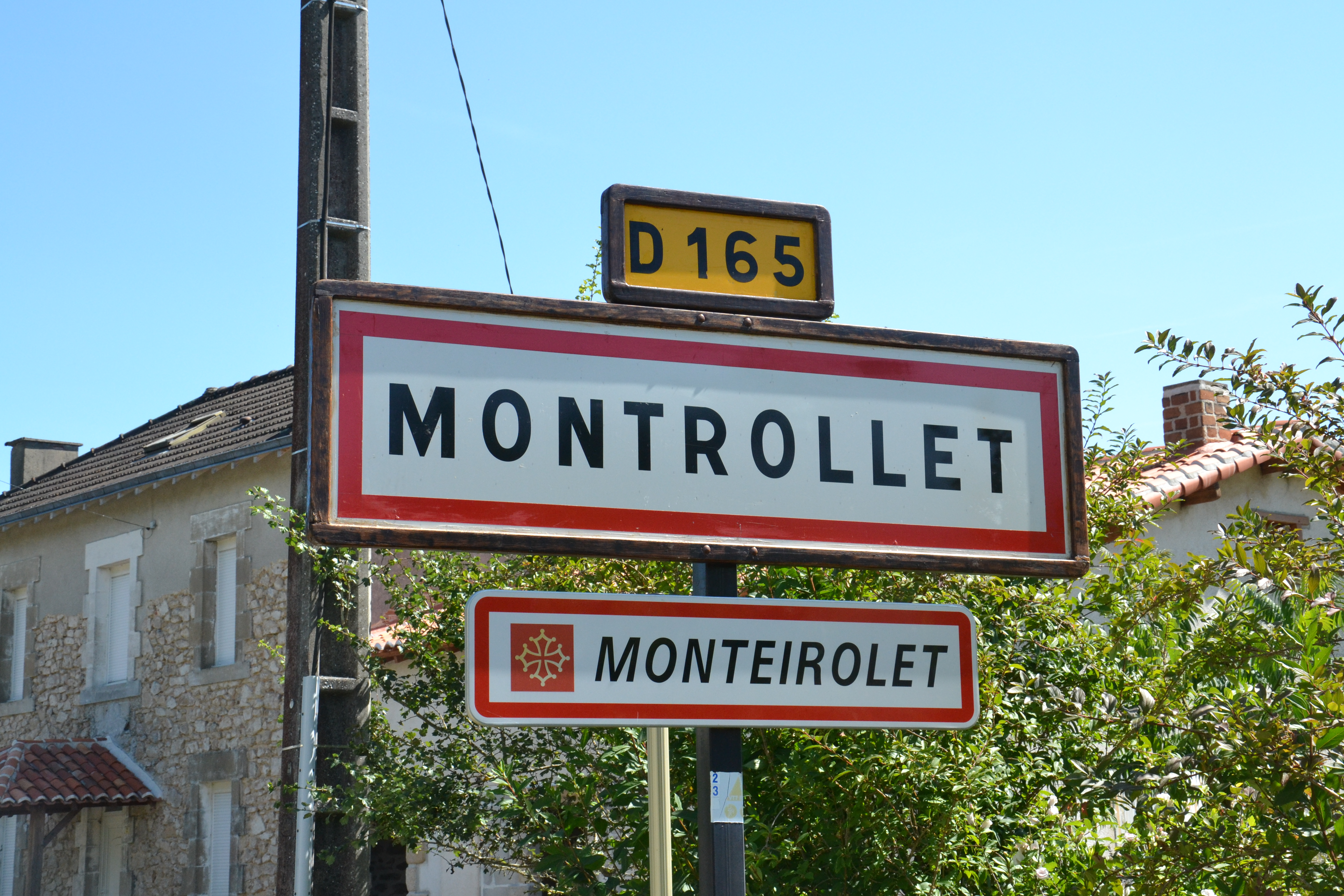 Panneau d'entrée du village de Montrollet en français et occitan (Charente, France)